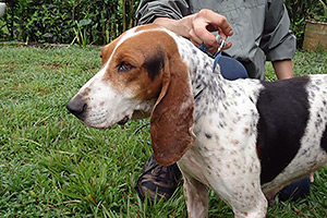 Foto tomada por el señor alvarez de Perro Fino Colombiano